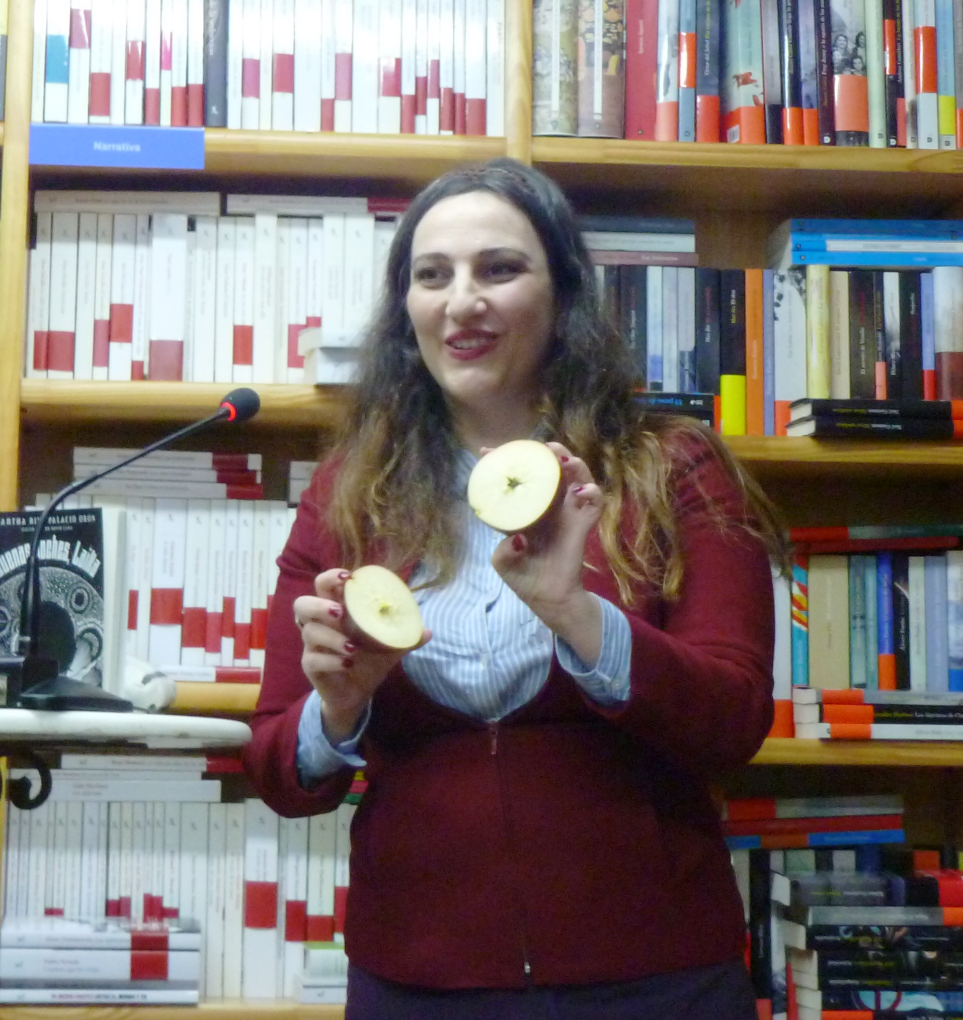 Estíbaliz Espinosa recitando na Libraría Paz de Pontevedra o 12/04/2018